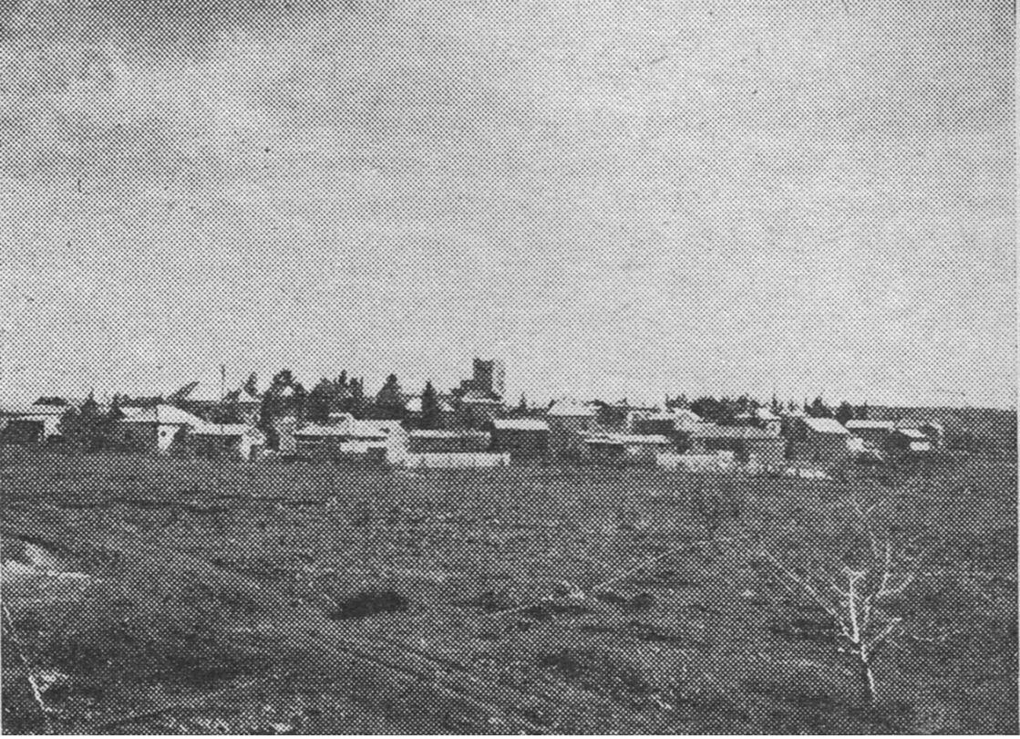 The Atarot village in 1944 כפר עטרות לפני מלחמת השירור, ב1944